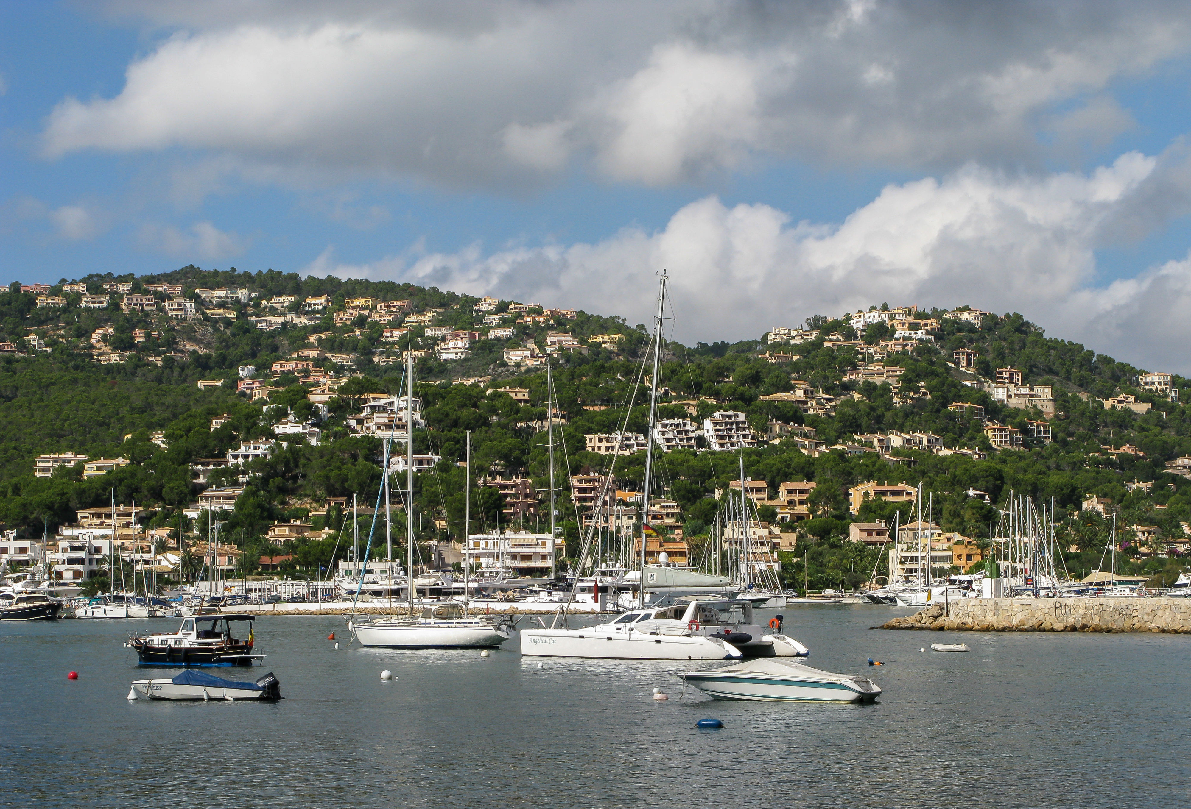 Port d'Andratx, Hafen